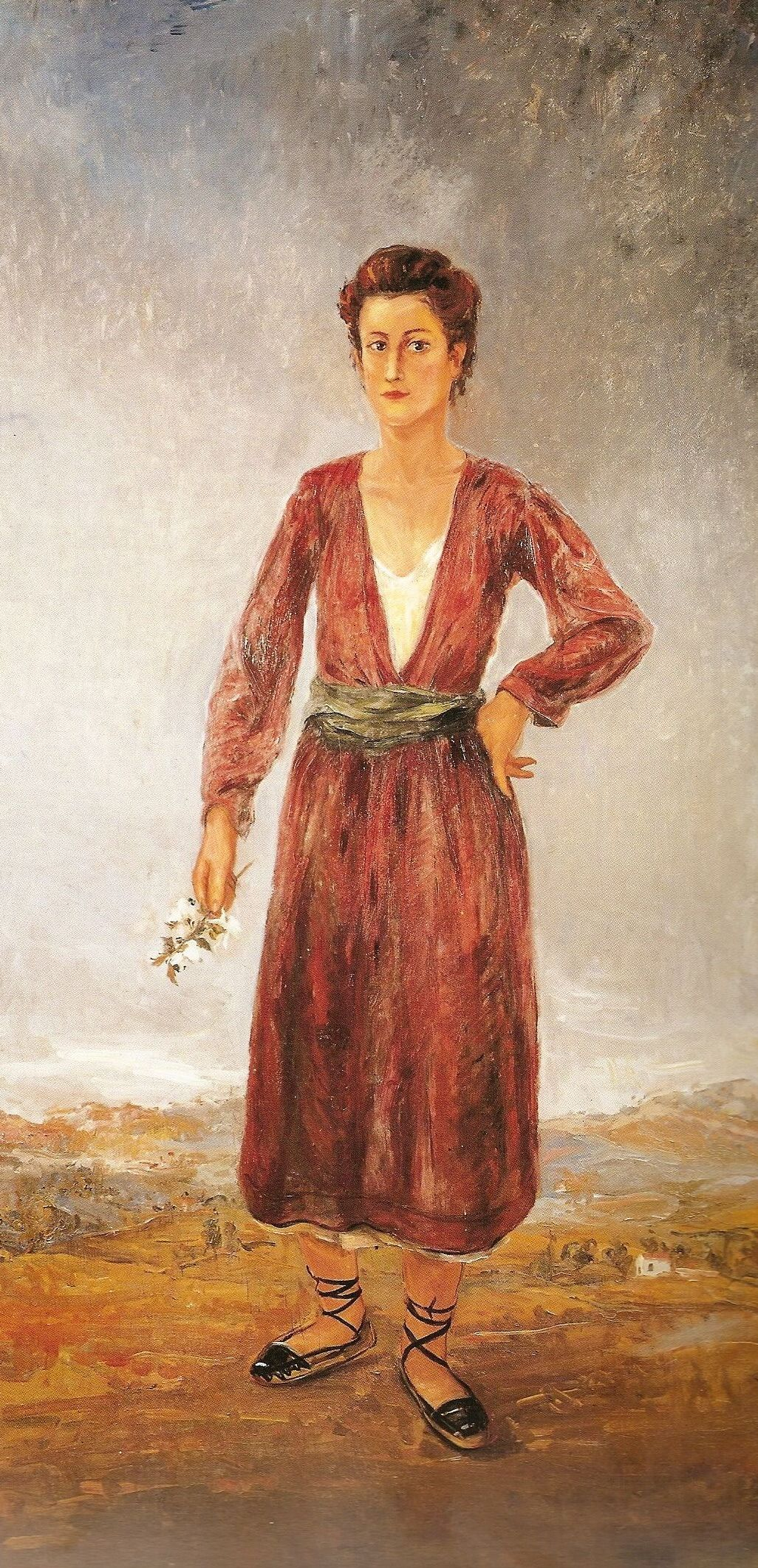 Retrat de la Garriganga